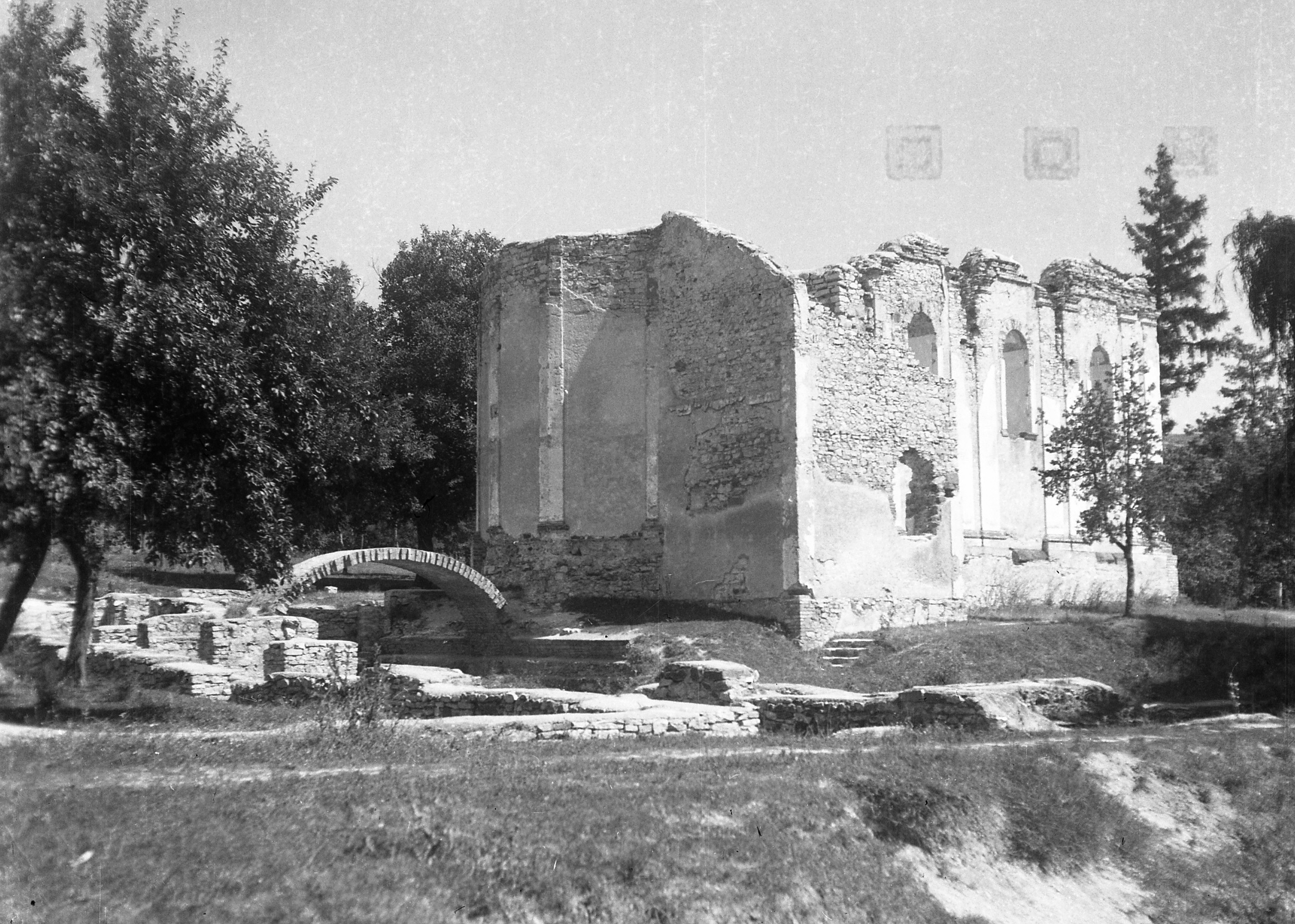 Veszprémvölgyi apácakolostor és Jezsuita templom romjai. Location: Hungary Title: Veszprémvölgyi apácakolostor és Jezsuita templom romjai.